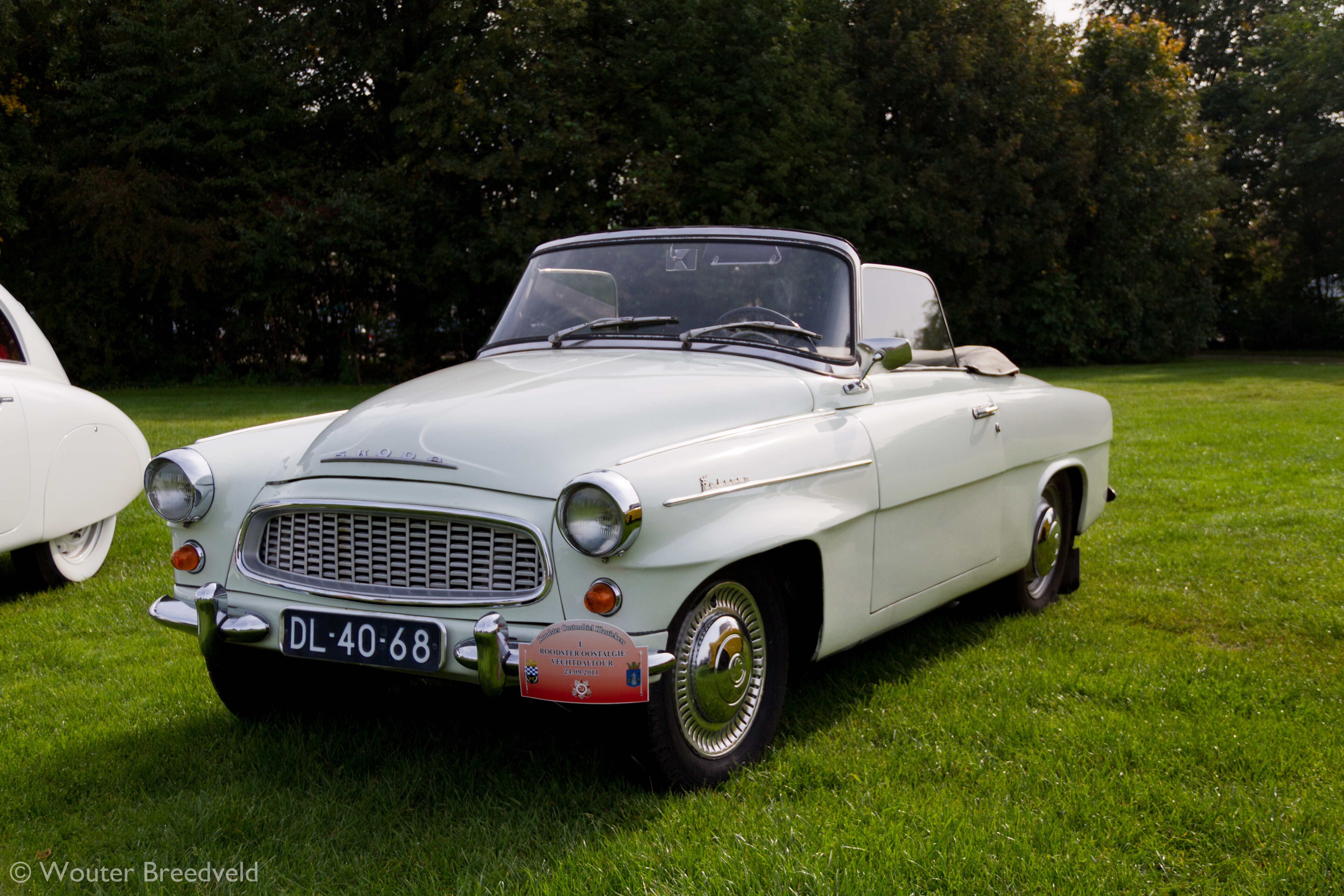 Škoda 450 Felicia Cabrio